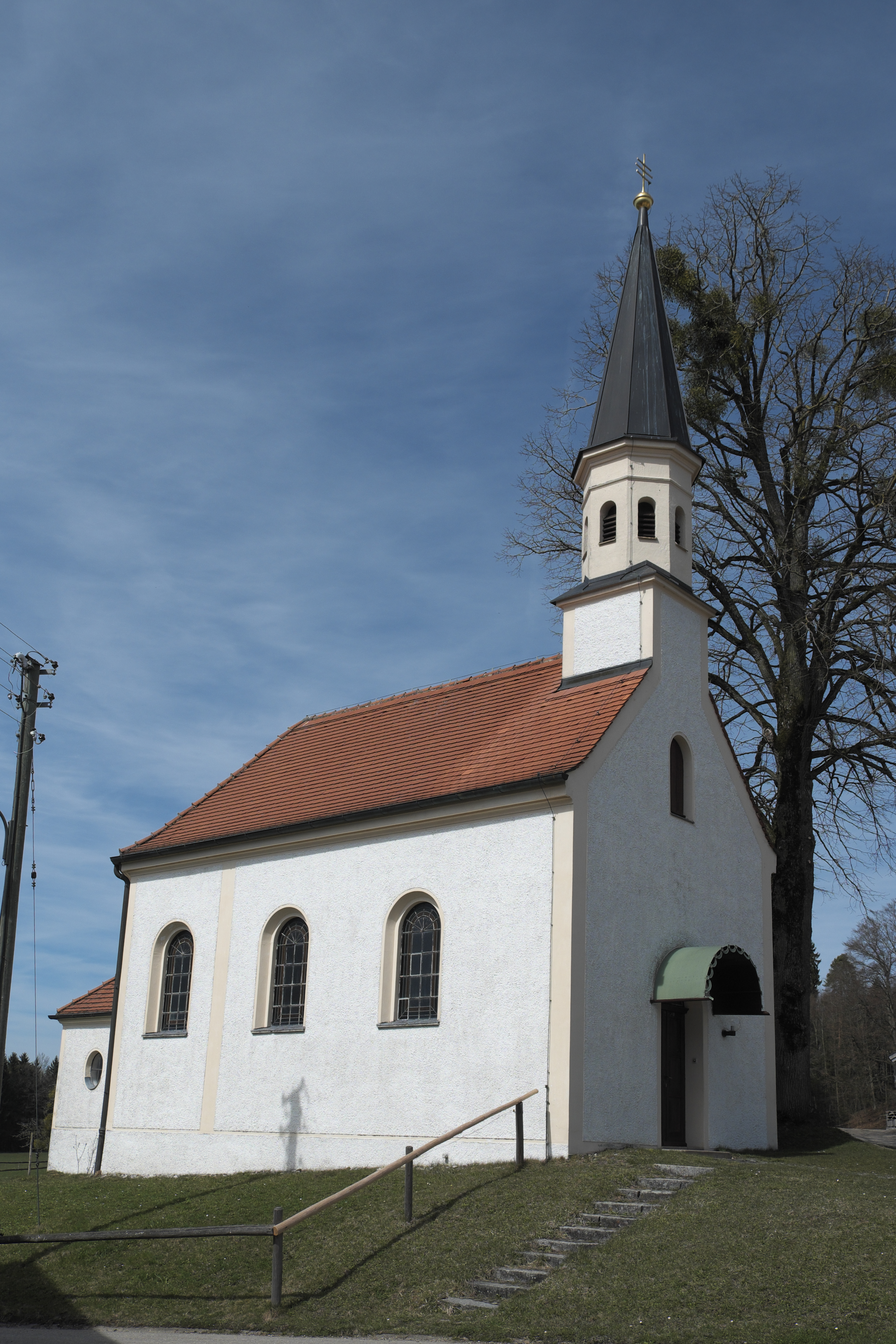 Kapelle St. Magdalena in Happerg, einem Ortsteil von Eurasburg im Landkreis Bad Tölz-Wolfratshausen (Bayern/Deutschland)